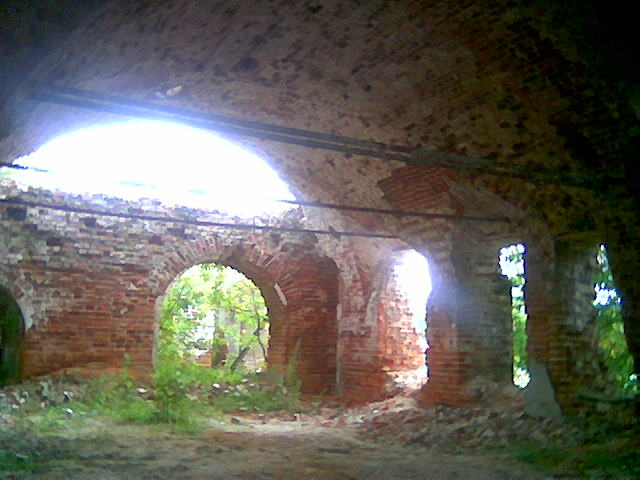 село Александрово. Церковь. Руины. Интерьер